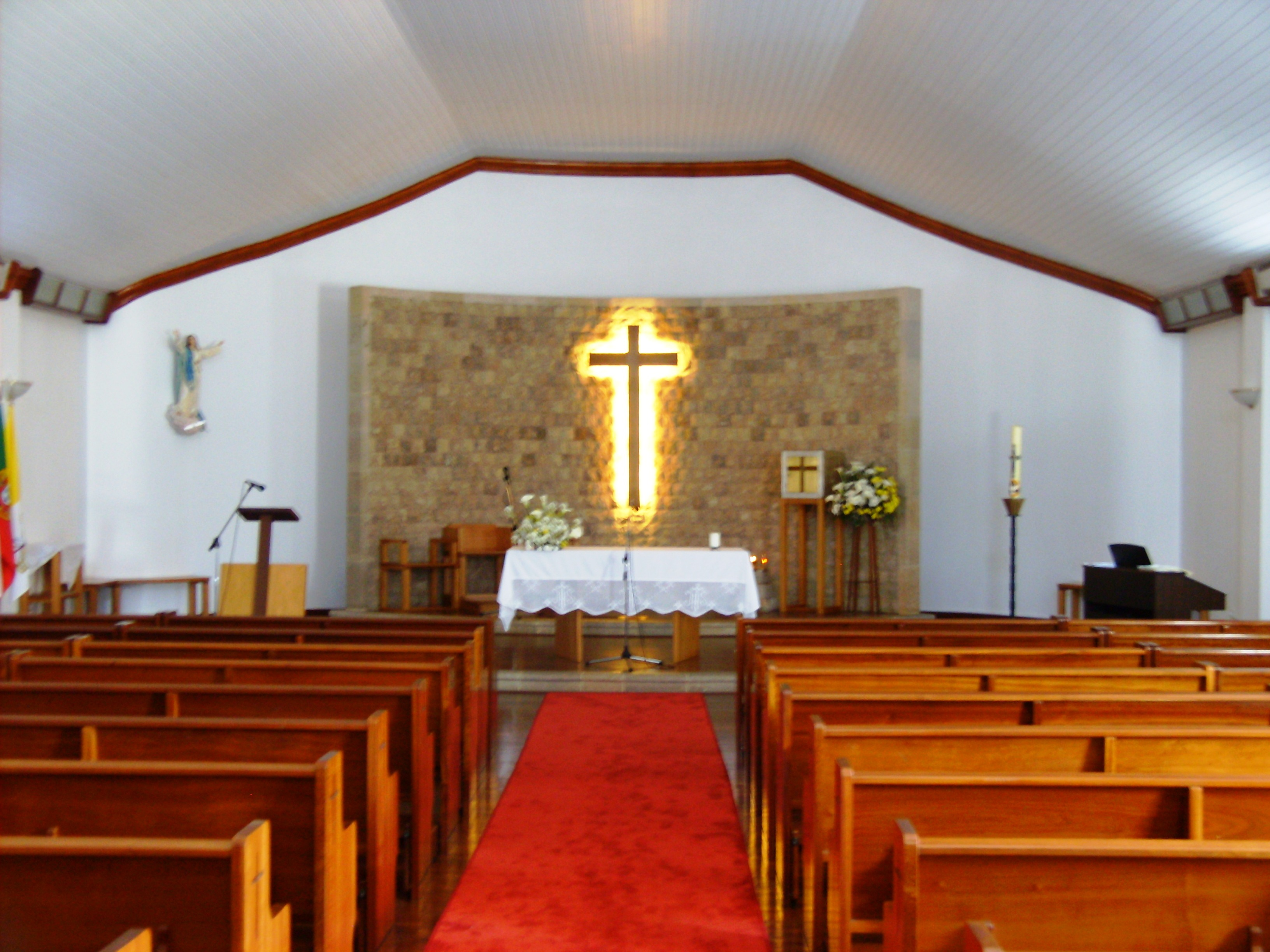 Igreja de Nossa Senhora do Ar, Ilha de Santa Maria (Açores), Portugal.